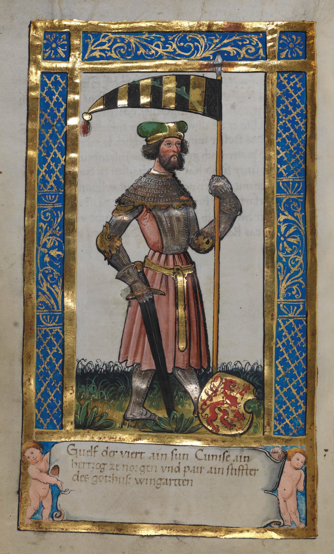 Weingartener Stifterbüchlein, Württembergische Landesbibliothek Stuttgart, Cod.hist.qt.584, fol. 25v, Stifterbild Herzog Welf IV. Guelf der viert ain sun Cunise ain hertzog ze norgau vnd pair ain stiffter des gotzhuß wingartten